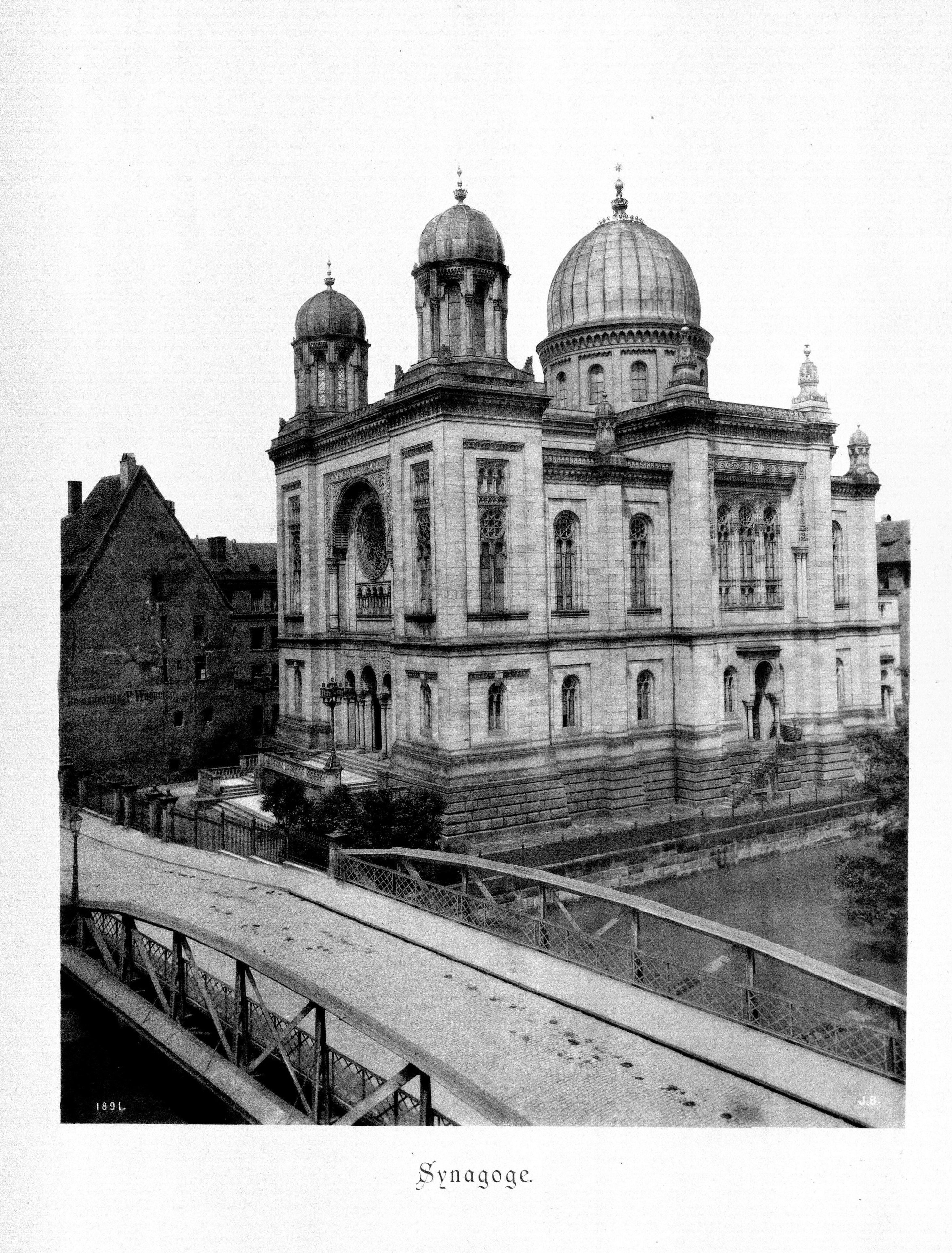 Synagoge. aus dem Band Die Baudenkmäler der Stadt Nürnberg. Erste Nürnberger Lichtdruckanstalt & Kunstverlag Brunner. Nürnberg 1891. 2011 digitalisiert von der Ohm-Hochschulbibliothek Nürnberg. Exemplar mit der Signatur: Nürnberg, Ohm-Hochschulbibliothek -- 901/2.213 / M a